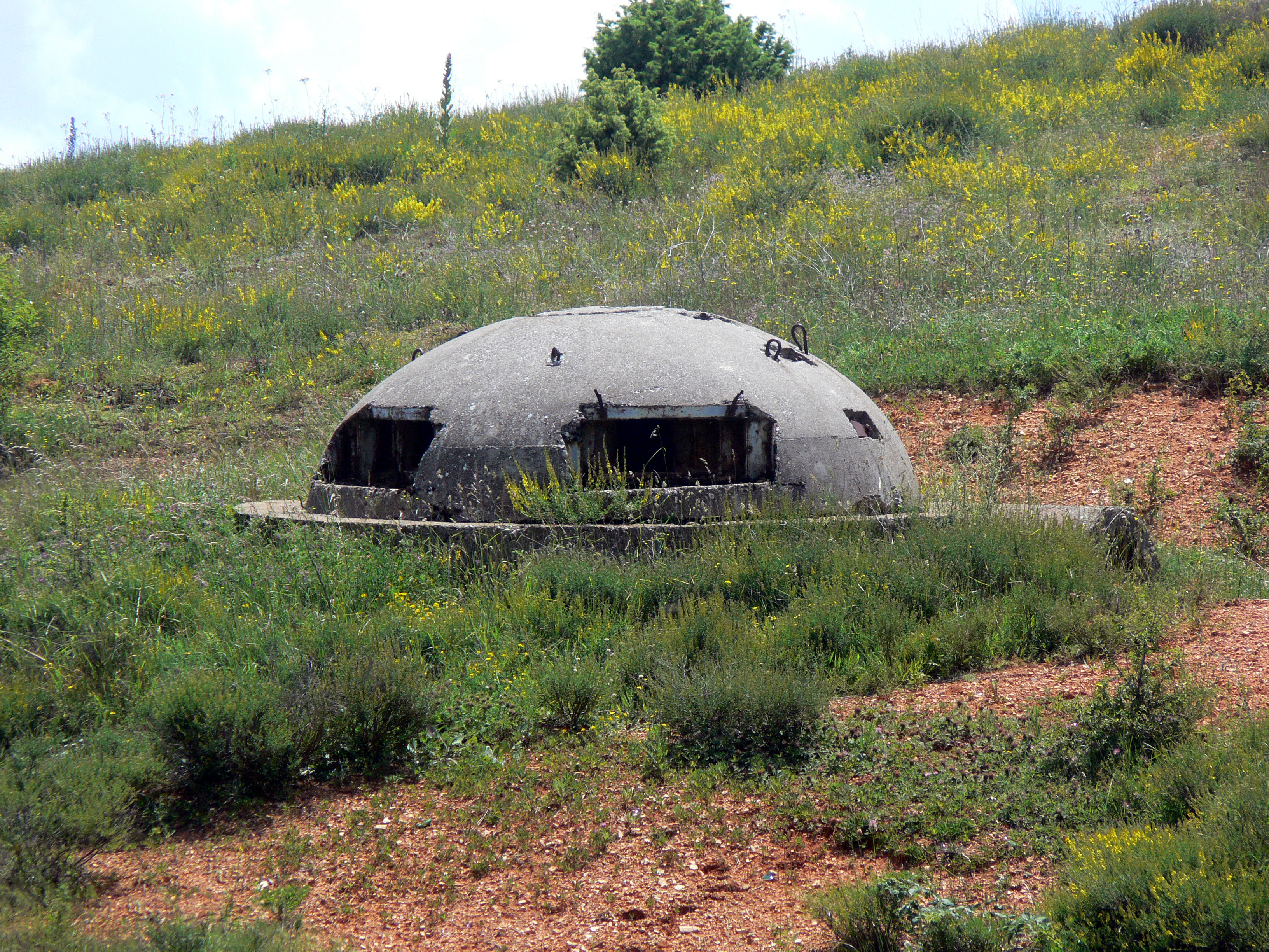 Bunker an der albanisch-makedonischen Grenze